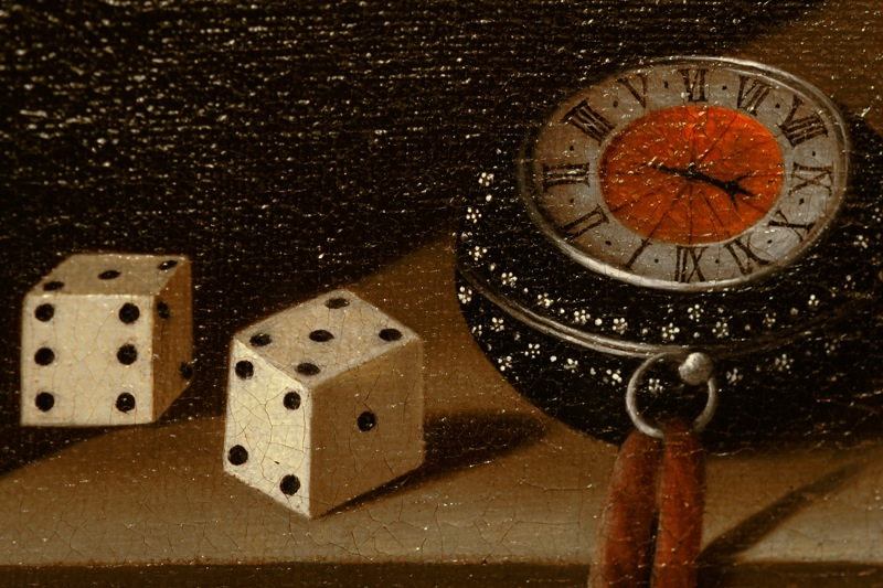 Vanitas, Adriaan Coorte